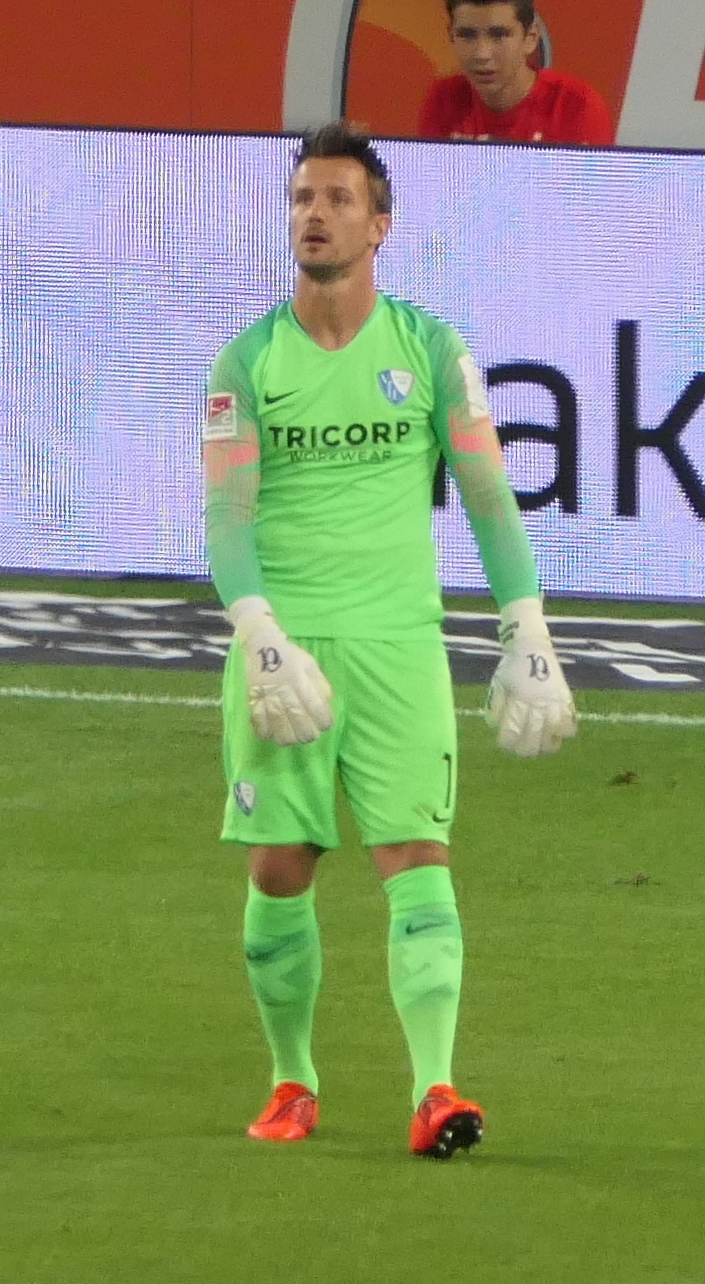 Der Fussballprofi Manuel Riemann im Trikot vom VfL Bochum beim Auswärtsspiel gegen den VfB Stuttgart am 02.09.2019.